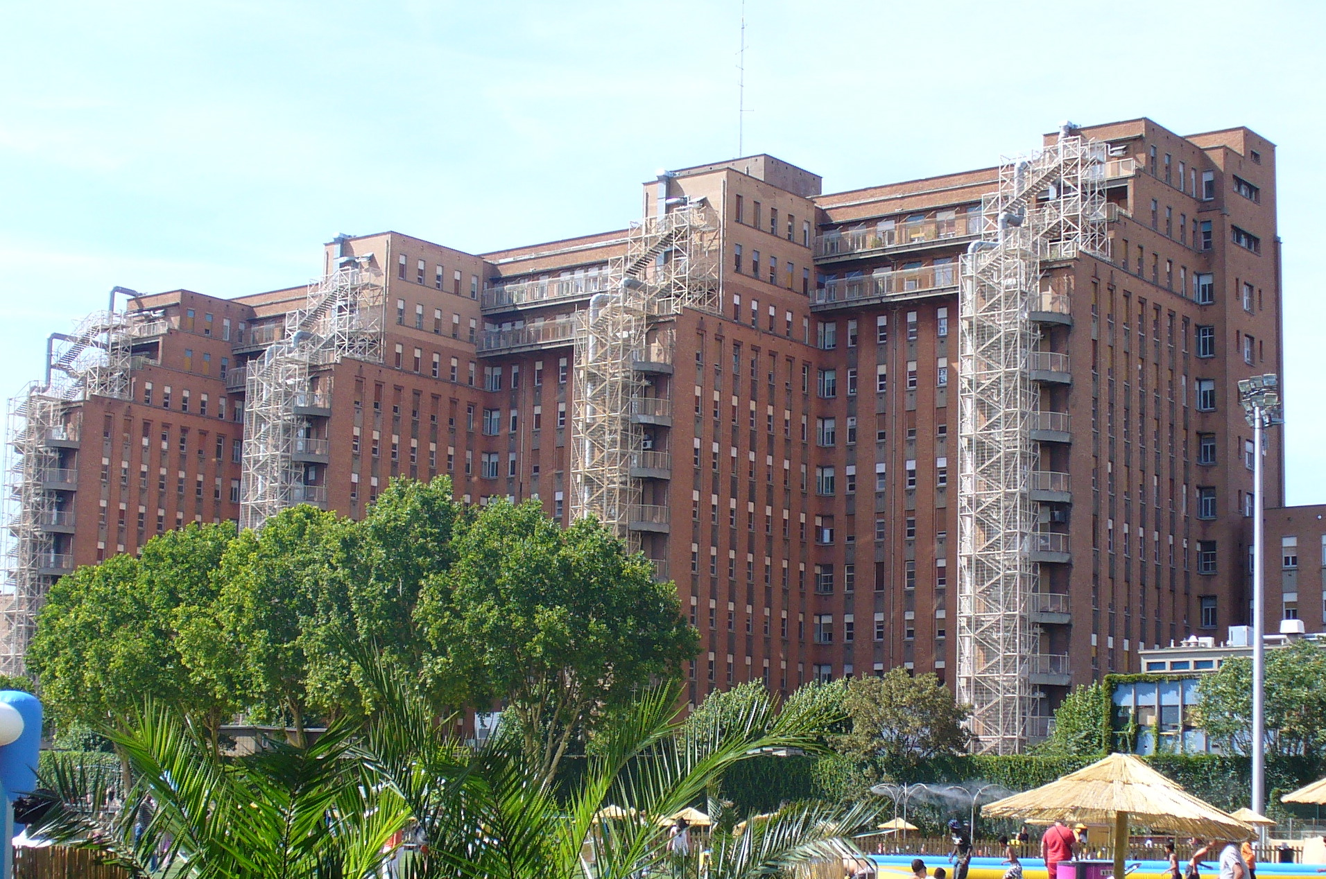 Hôpital Beaujon à Clichy (Hauts-de-Seine, Île-de-France, France).